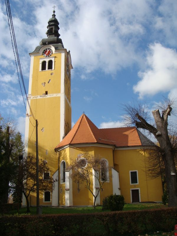 crkva Svetog Vida u Vrbovcu